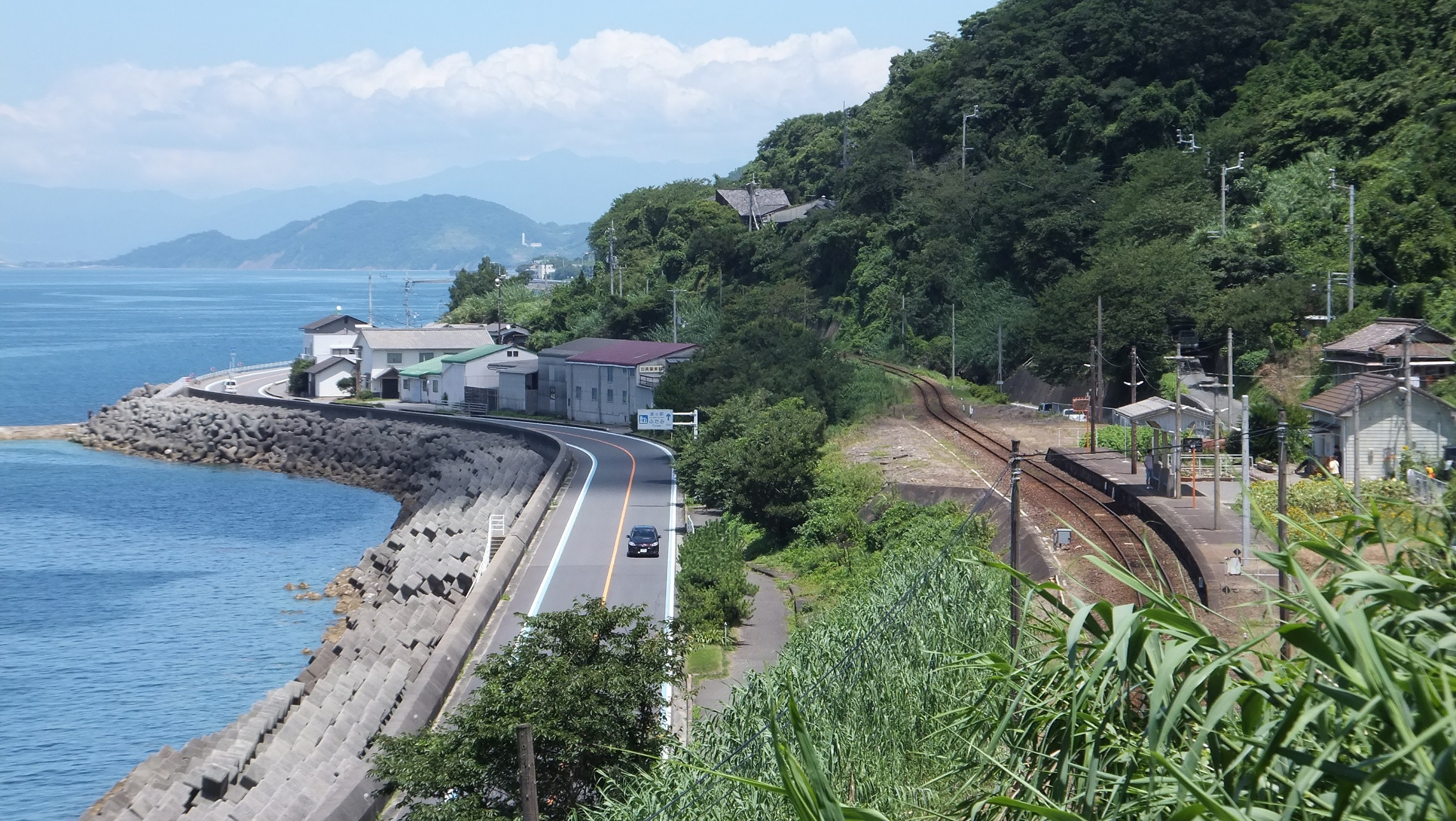 愛媛県伊予市双海町 国道378号（夕やけこやけライン）と予讃線下灘駅（右）